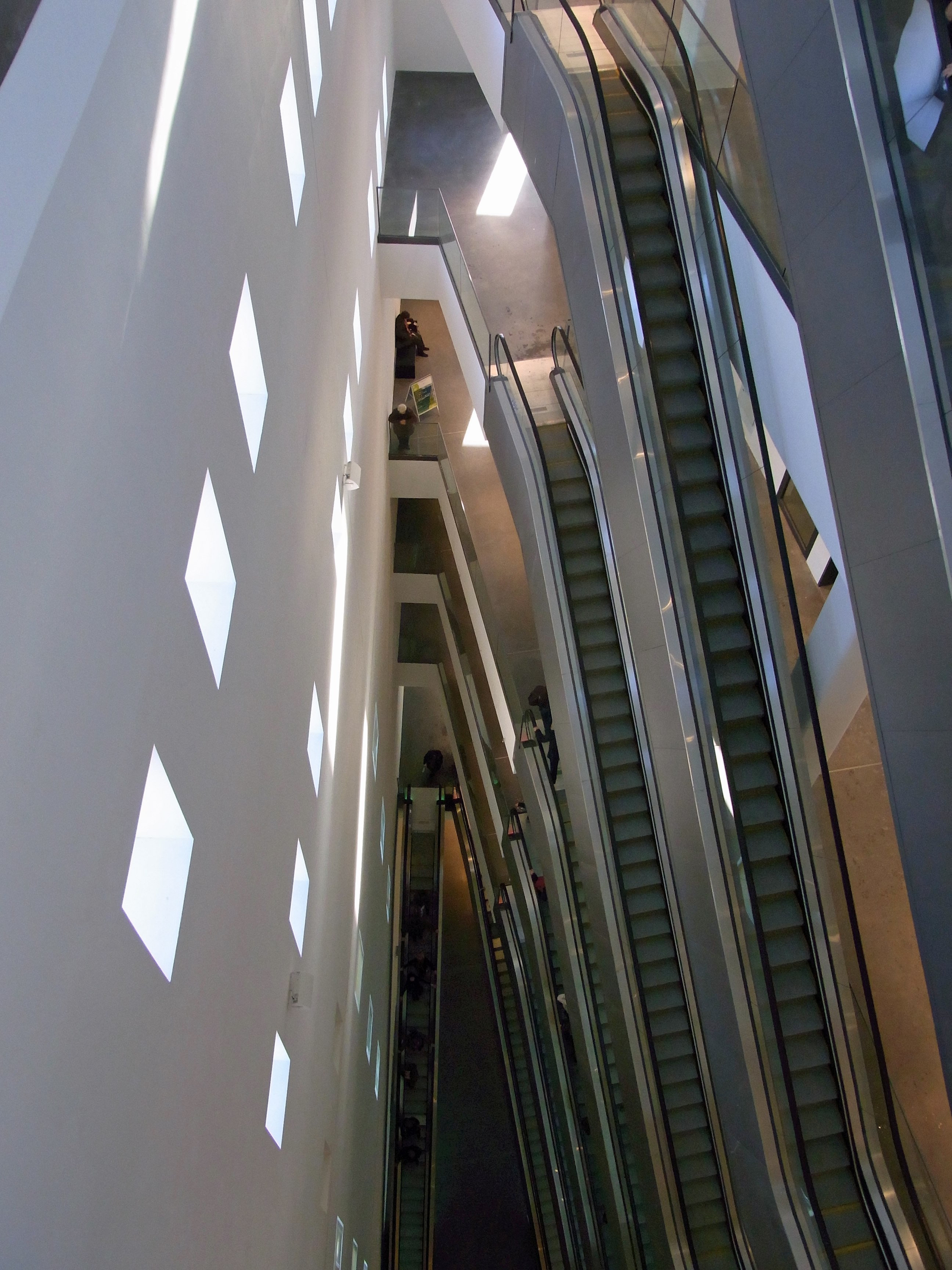 RUHR.2010 – Kulturhauptstadt Europas Ruhr.2010 - Das Finale Abschlussveranstaltung am 18. Dezember 2010 am Dortmunder U Kunstvertikale